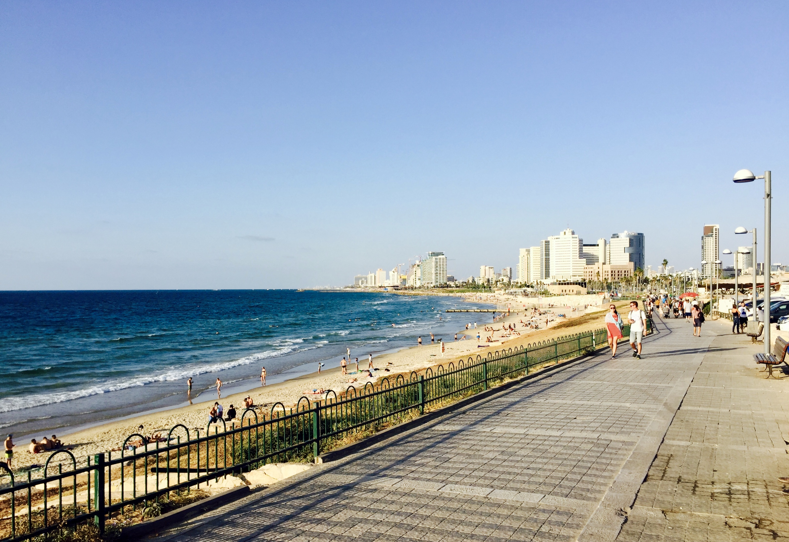 Tel Aviv, vy norrut från Jaffa